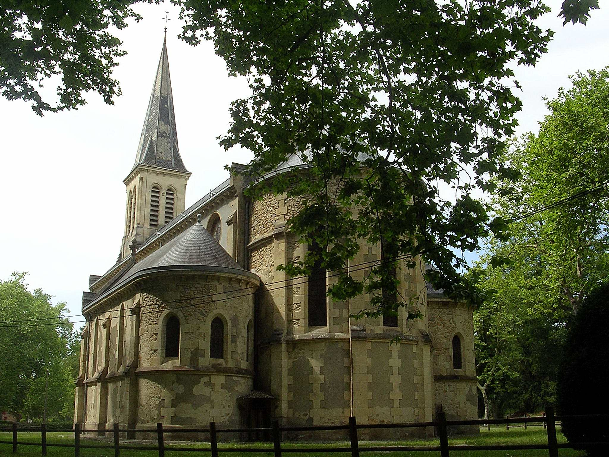 Église Saint-Louis d'Uza, dans le département français des Landes